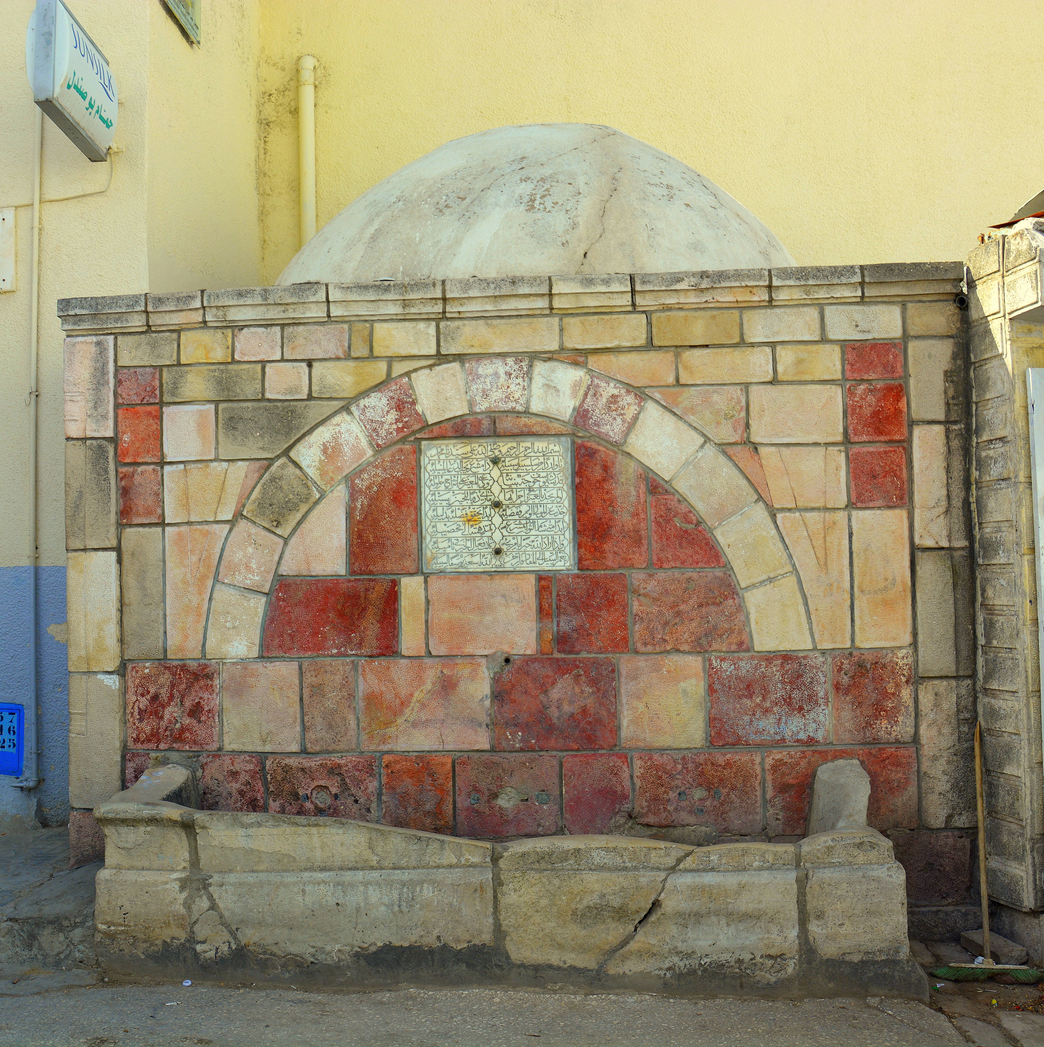 Fontaine et bassin dit du Sahab-Et-Taba